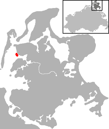 Mecklenburg-Vorpommern, Die Insel Öhe Bay, near Schaprode (marked red)